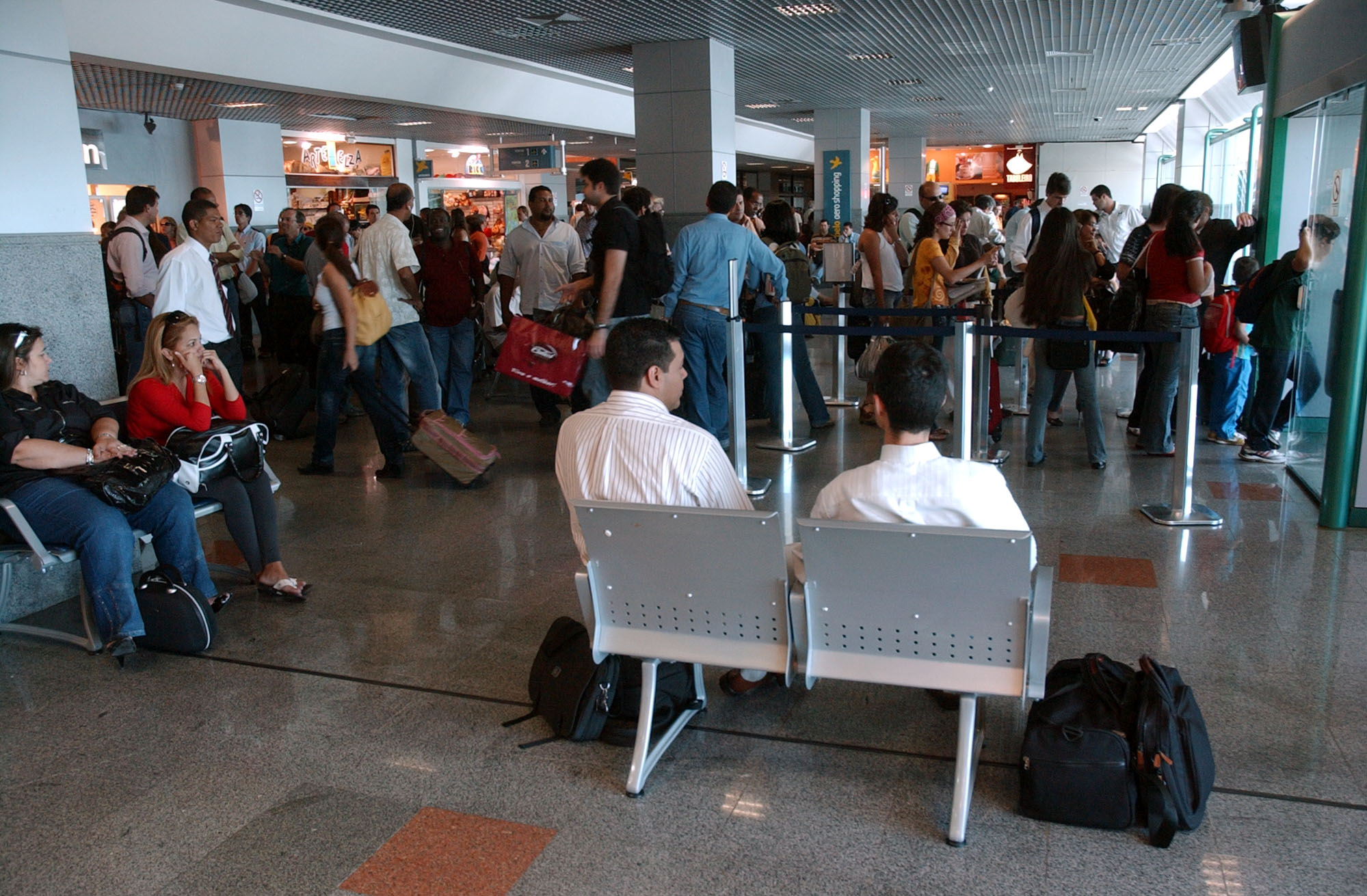 Salvador (BA) - Sala de embarque do Aeroporto Luiz Eduardo Magalhães, que também foi afetado pelos atrasos e cancelamentos de vôos que começaram no fim de semana.